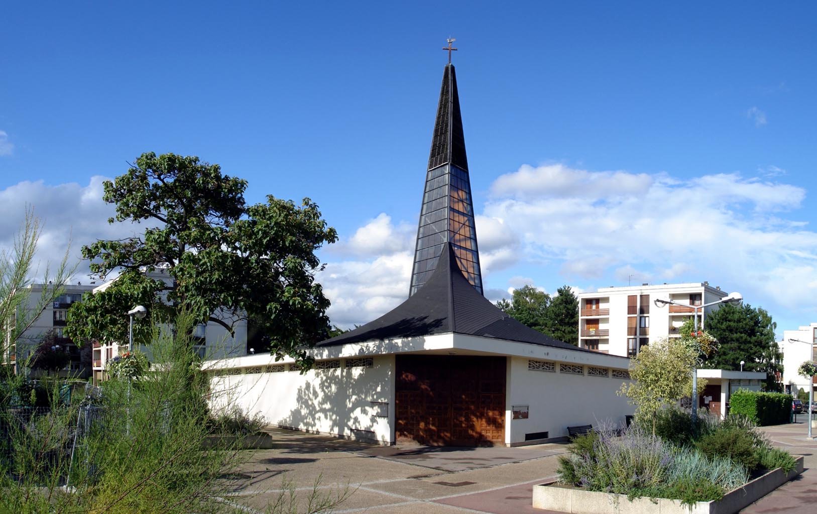 L'église Notre-Dame-des-Noues à Franconville (Val-d'Oise), France Quartier de l'Épine-Guyon Juillet 2007 Photo personnelle (own work) de Clicsouris